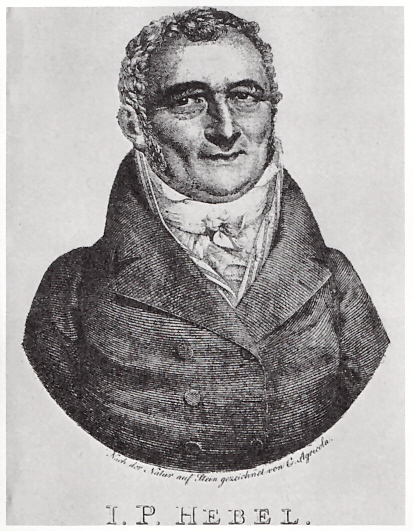 Johann Peter Hebel, Steinzeichnung von Carl Joseph Aloys Agricola, 1815, heute in Privatbesitz, Riehen CH Bildunterschrift: "Nach der Natur auf Stein gezeichnet von C. Agricola"